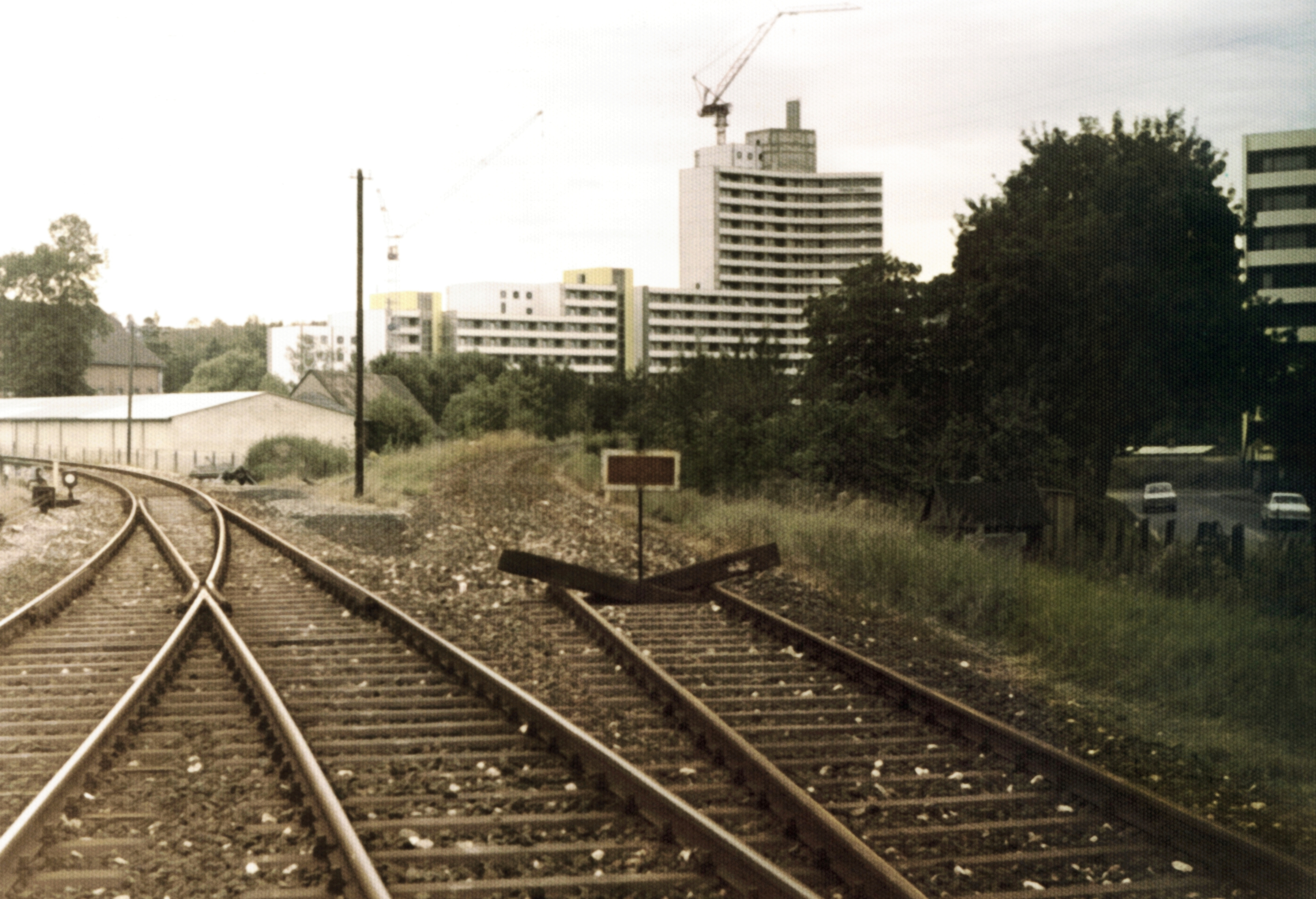 Bayreuth Altstadt Abzweig (Scan von Abzug)